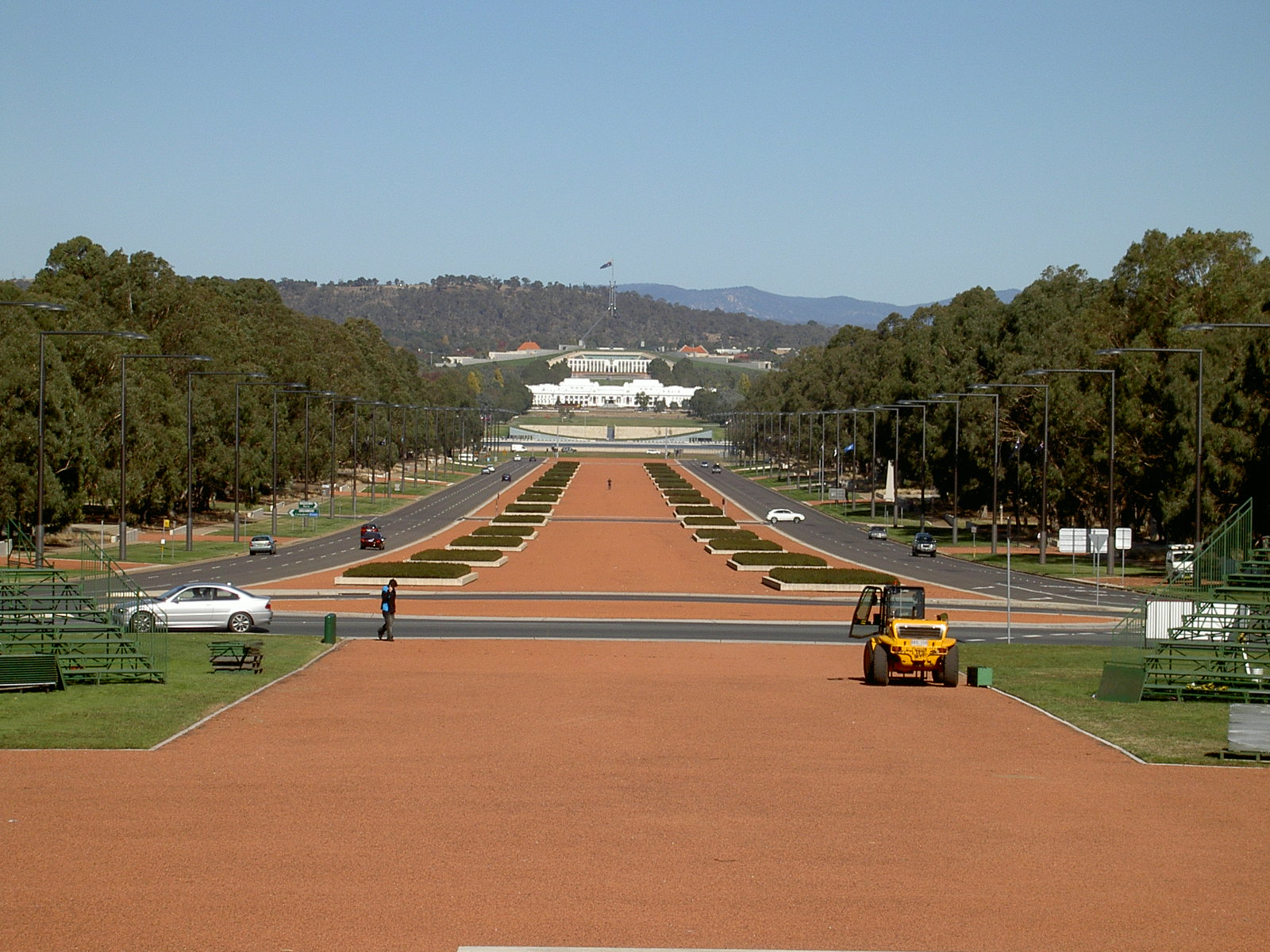 ANZAC Parade, Canberra, Australie.